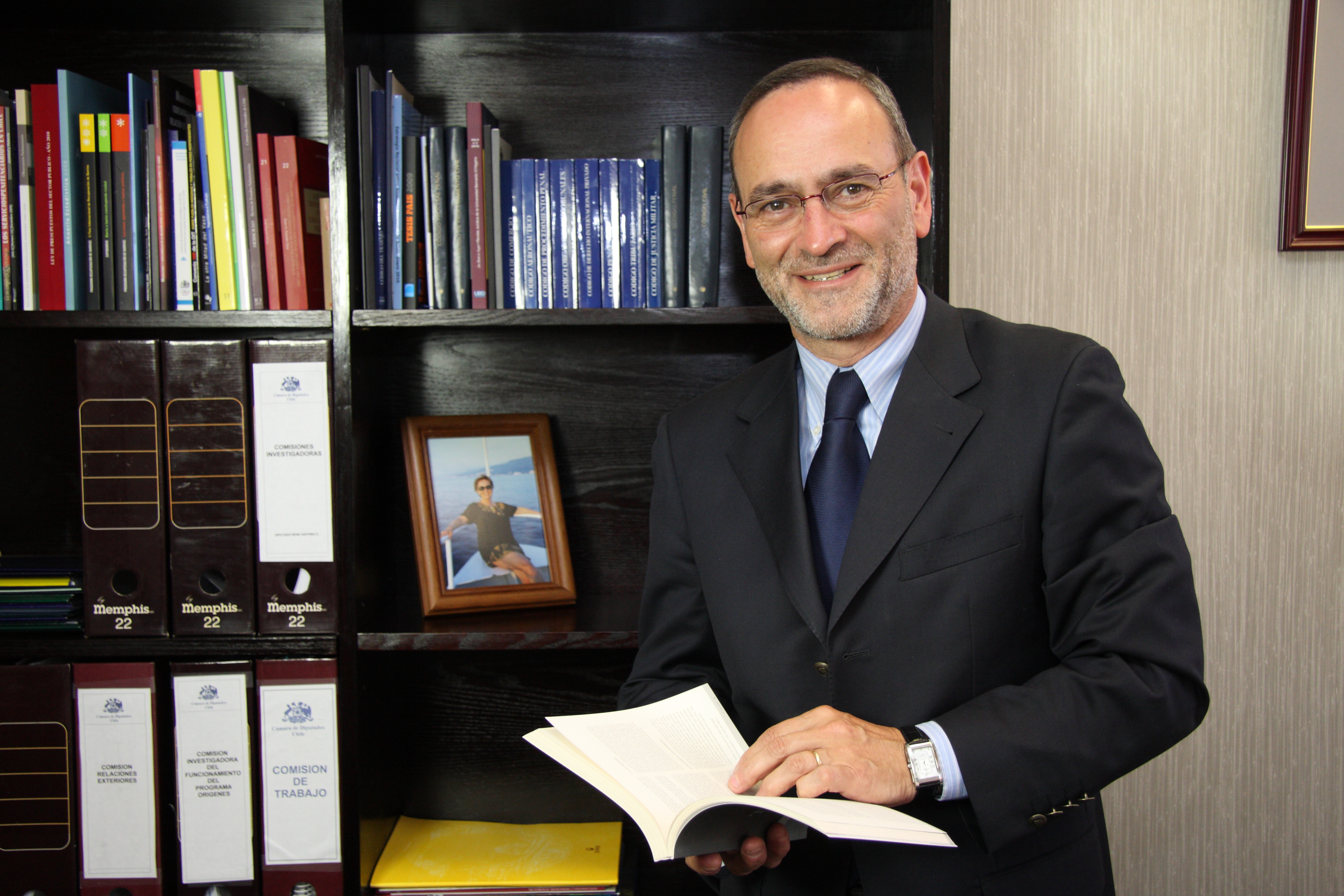 René Saffirio, político chileno.